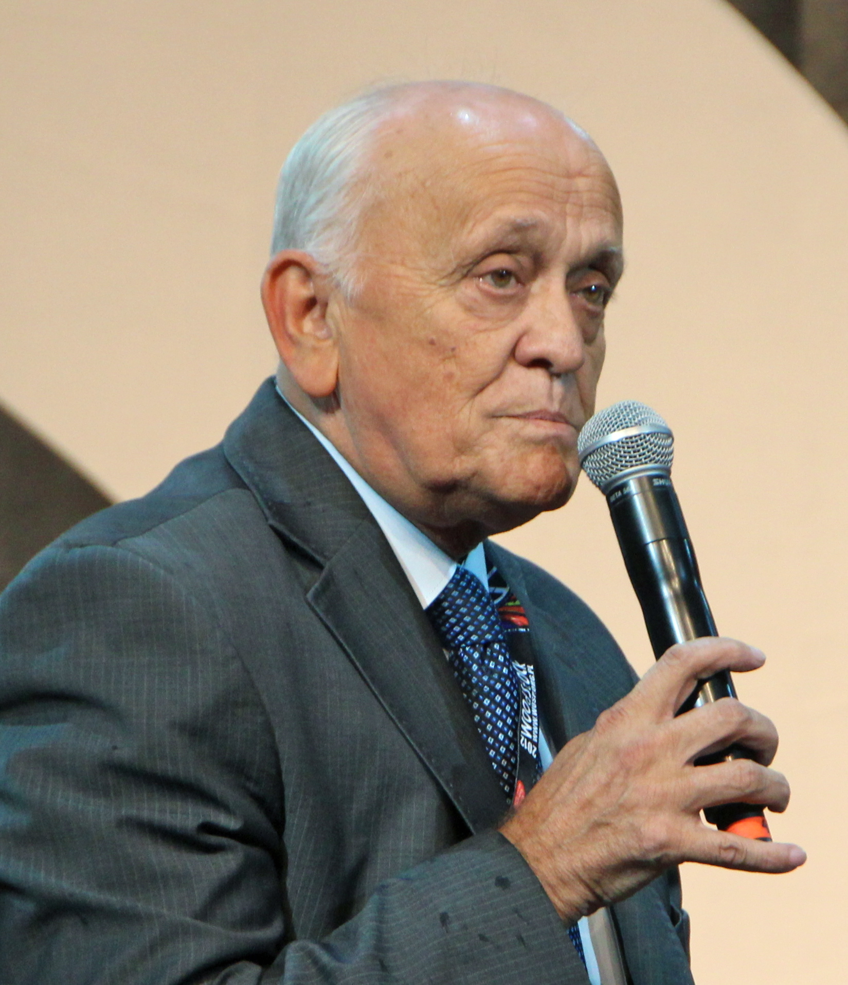 Przystanek Woodstock w 2012 r.